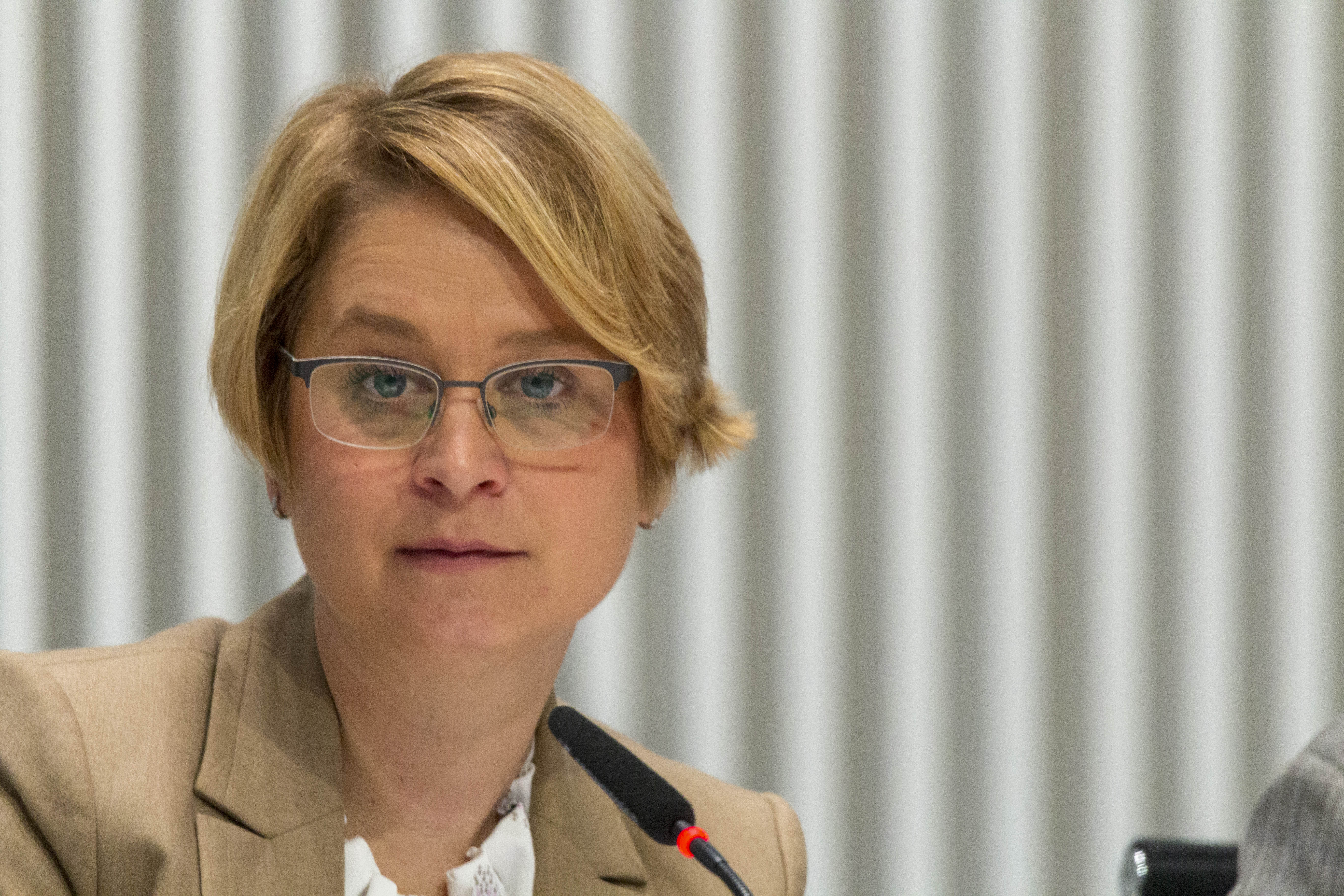 Abgeordnete des Landtages Mecklenburg-Vorpommern während einer Plenarsitzung Ende Januar 2020 in Schwerin.